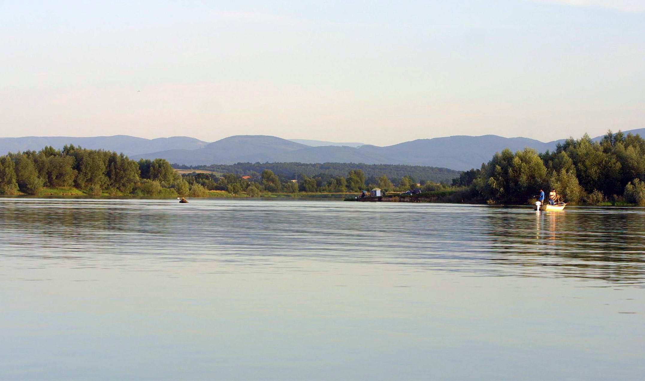 Jezioro Nyskie